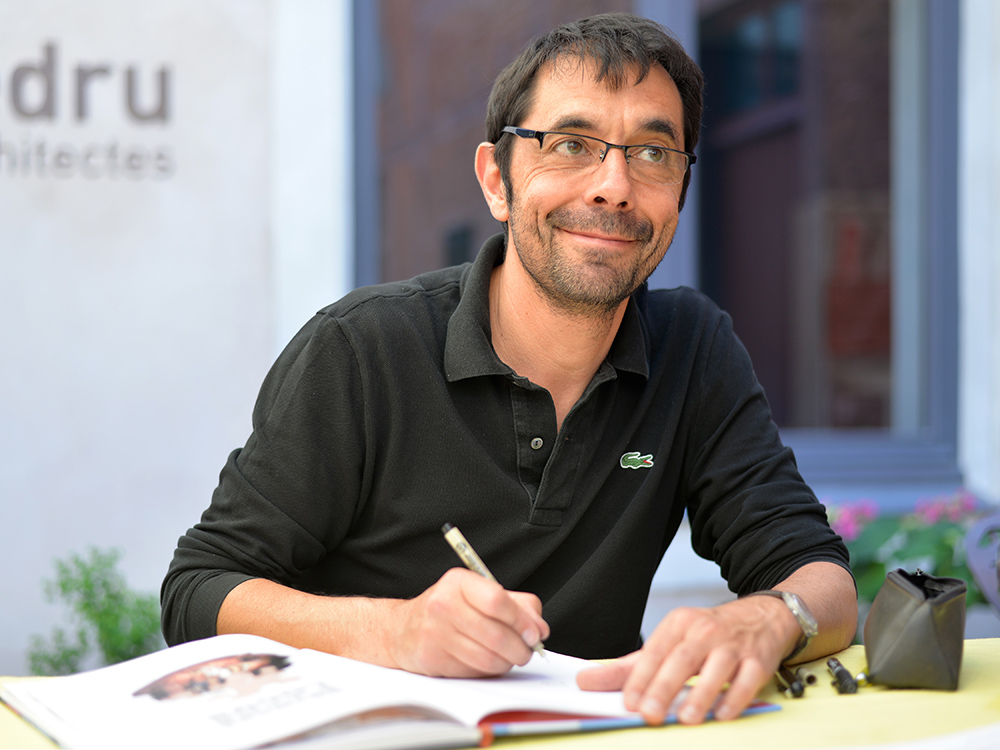 L'auteur de bande dessinée Olivier Schwartz en 2014.